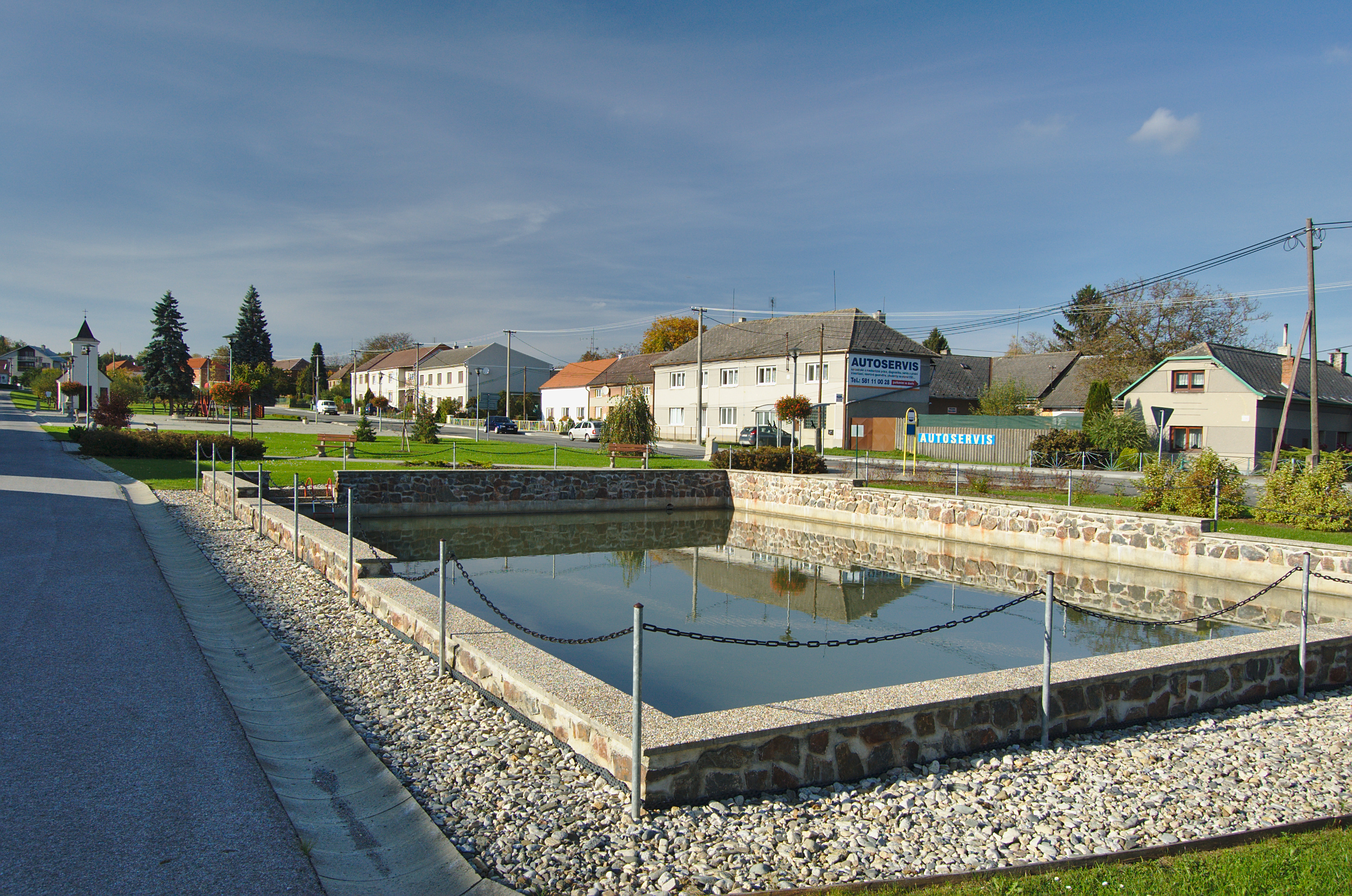 Kaple Nanebevzetí Panny Marie, Rakůvka, okres Prostějov